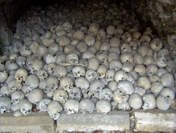 Blick in den Karner in Chammünster (Stadt Cham)